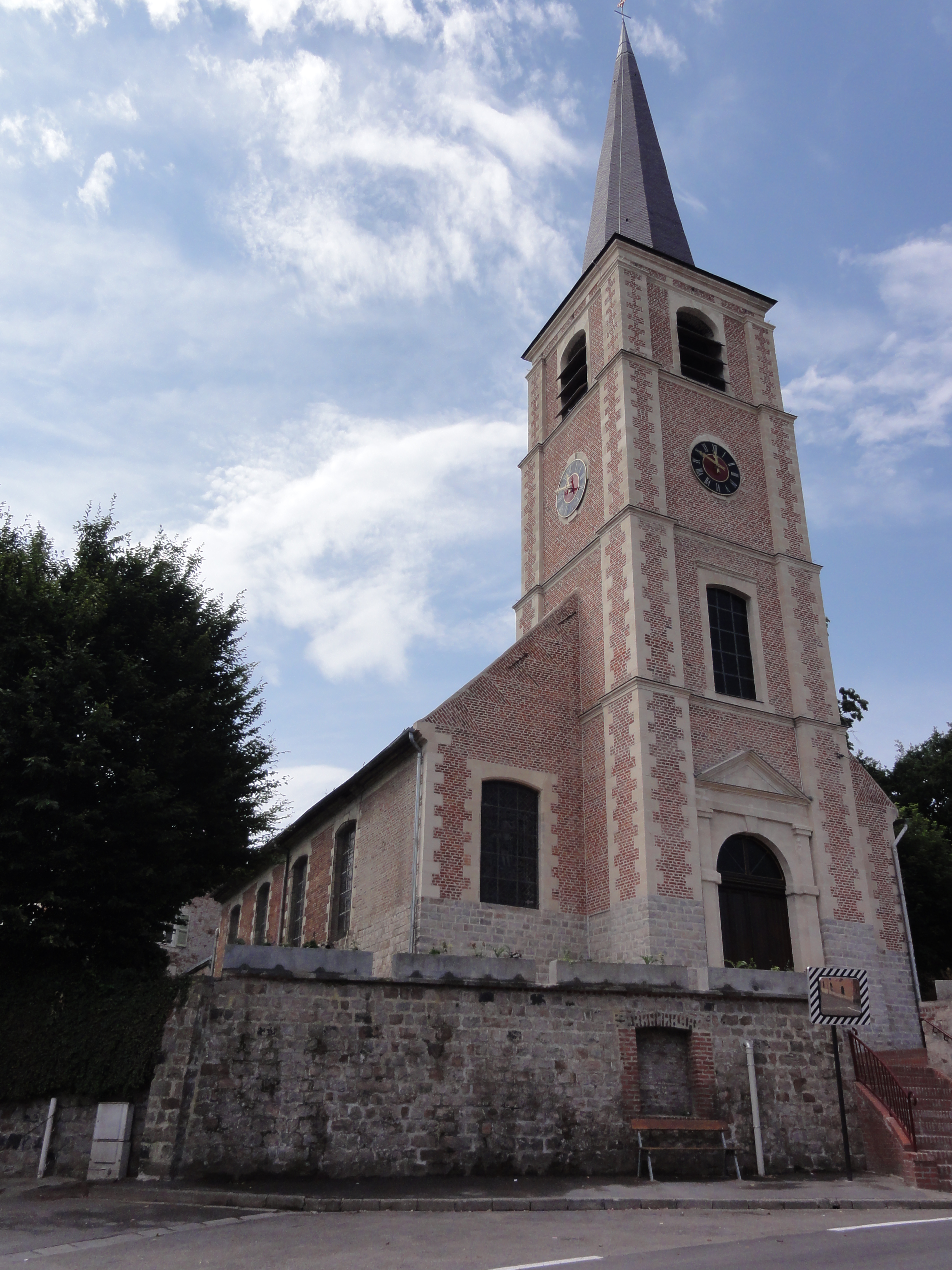 Artres (Nord,Fr) église